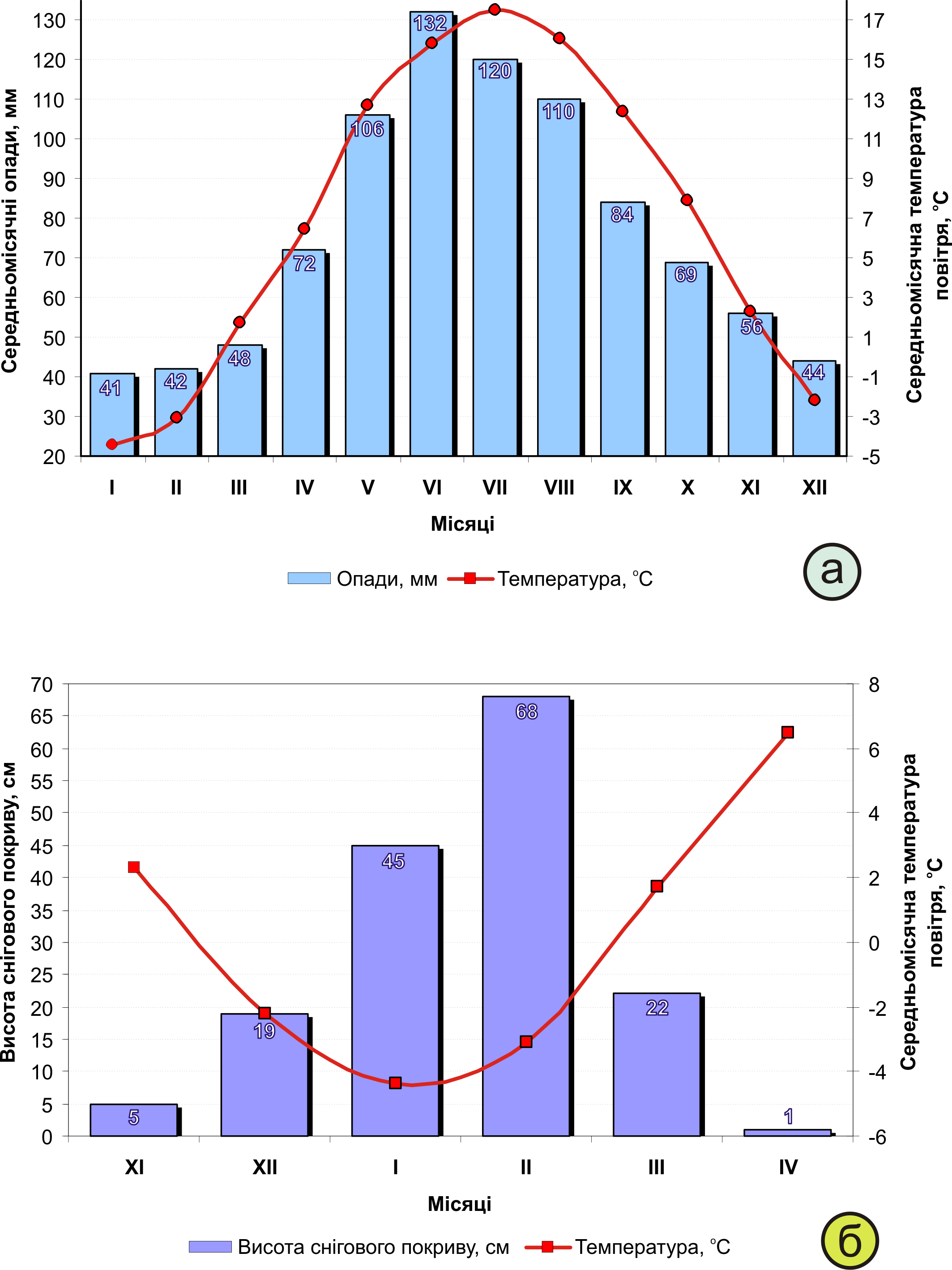 Комплексний кліматичний графік клімату по м/п Сколе